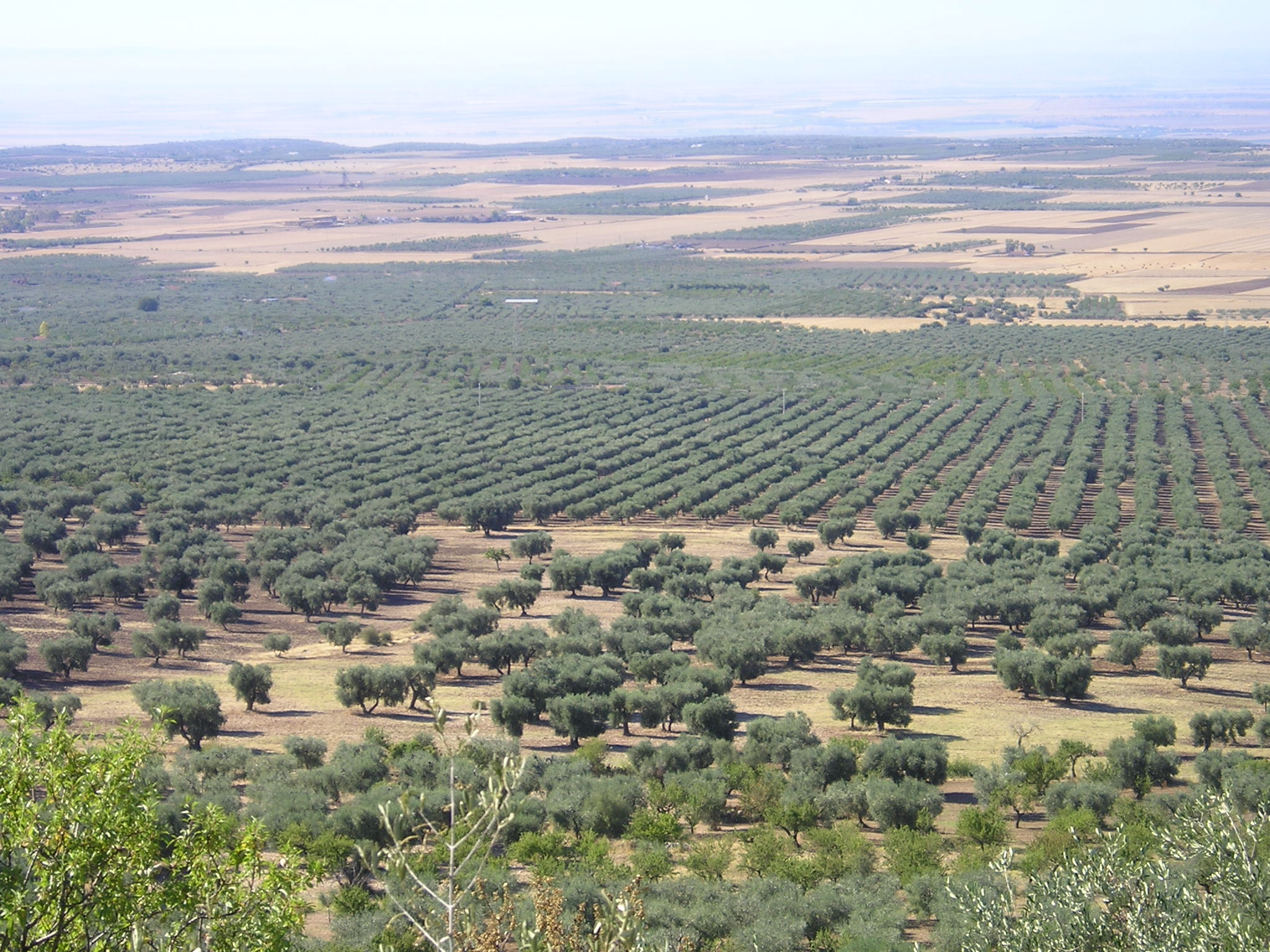 L'autore di questa immagine è Luigi-CC, e la rilascia nel pubblico dominio.